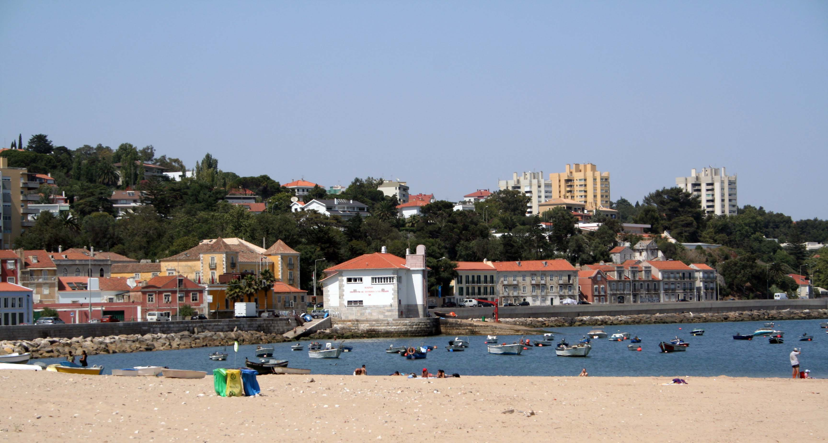 Description